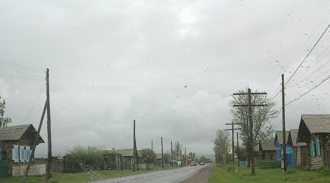 Главная улица Н.Торея